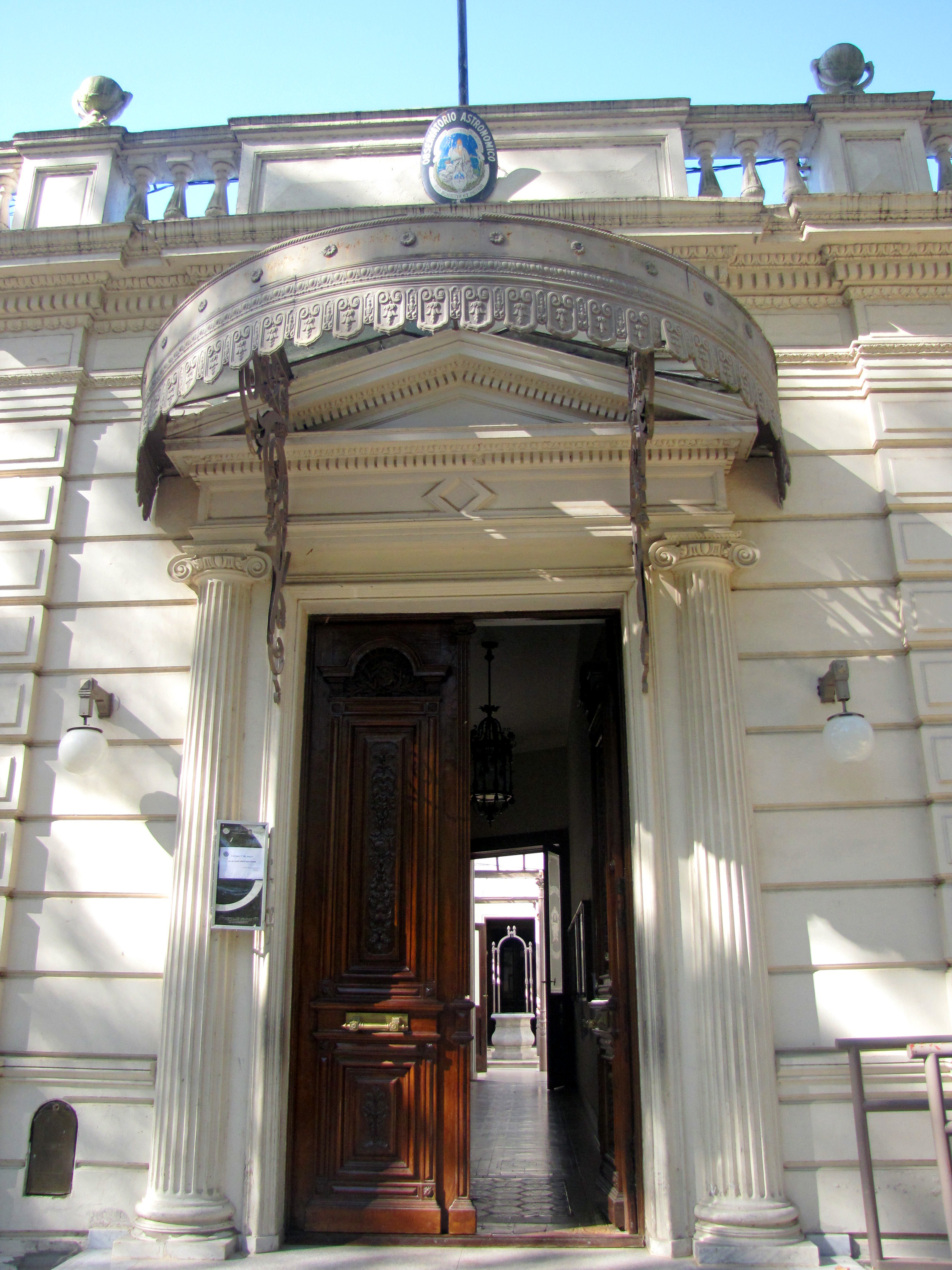 Fachada del Observatorio Astronómico de La Plata. Facultad de Ciencias Astronómicas y Geofísicas (UNLP.